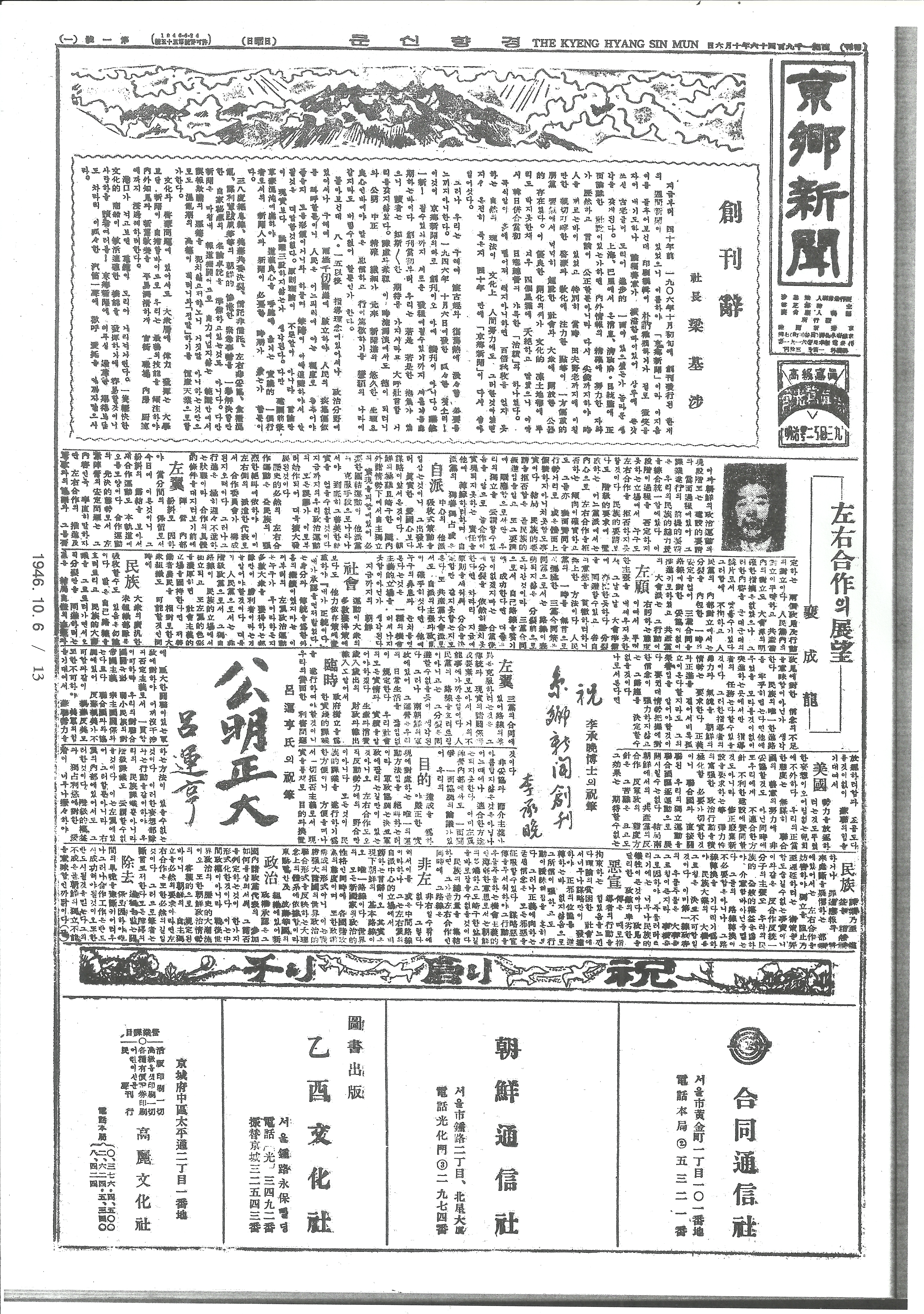 경향신문 창간호